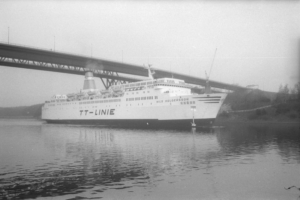 im Nord-Ostsee-Kanal vor der Holtenauer Hochbrücke.